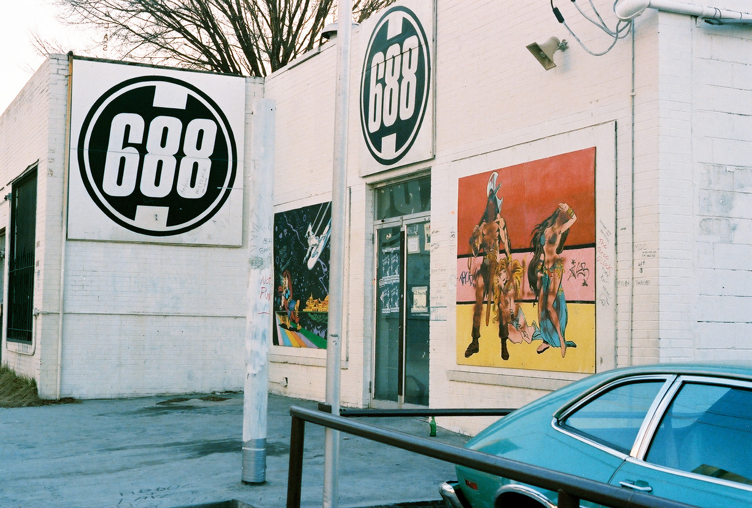 688 Club, Atlanta, 1984